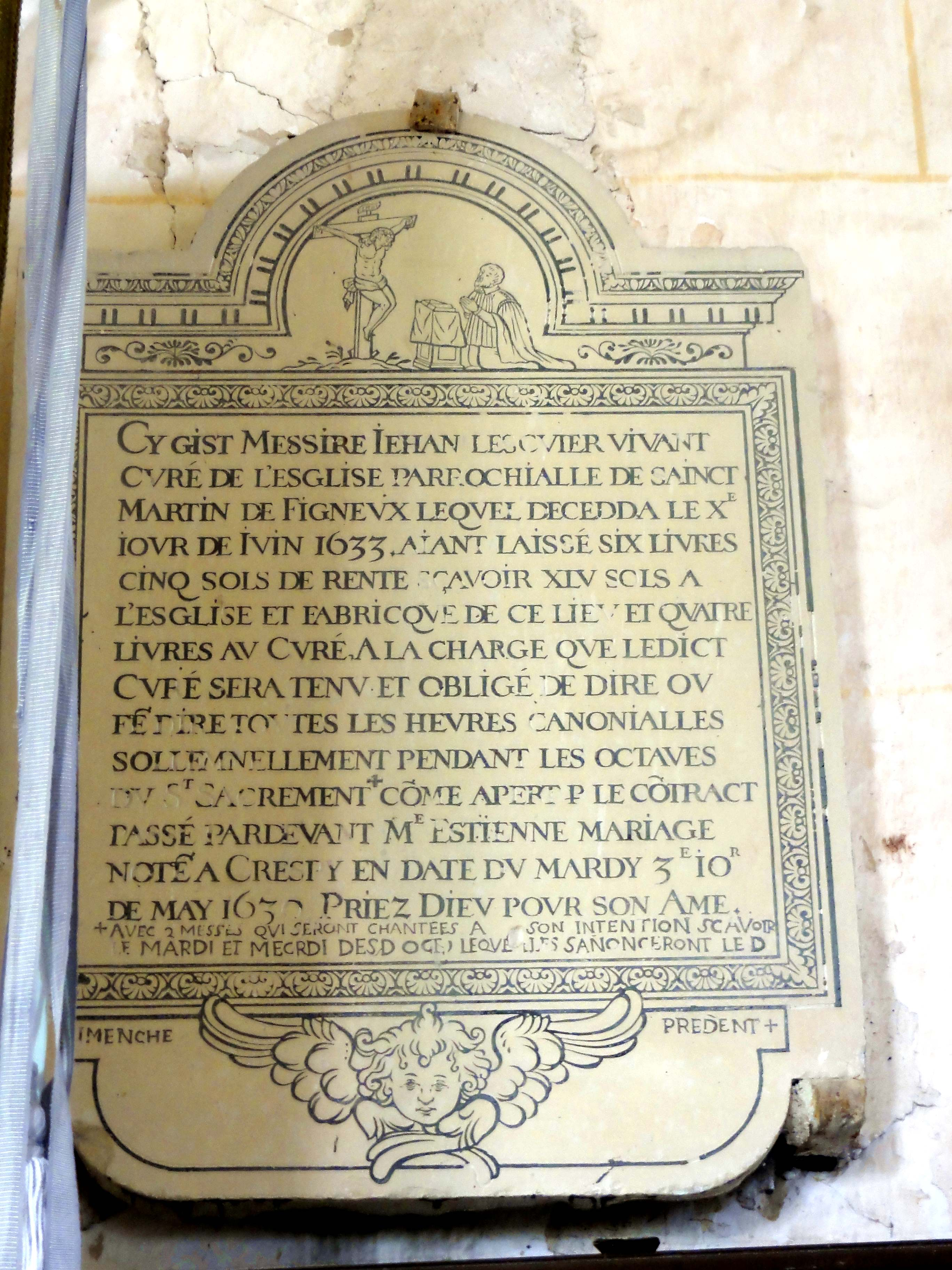 Mobilier de l'église - voir titre.